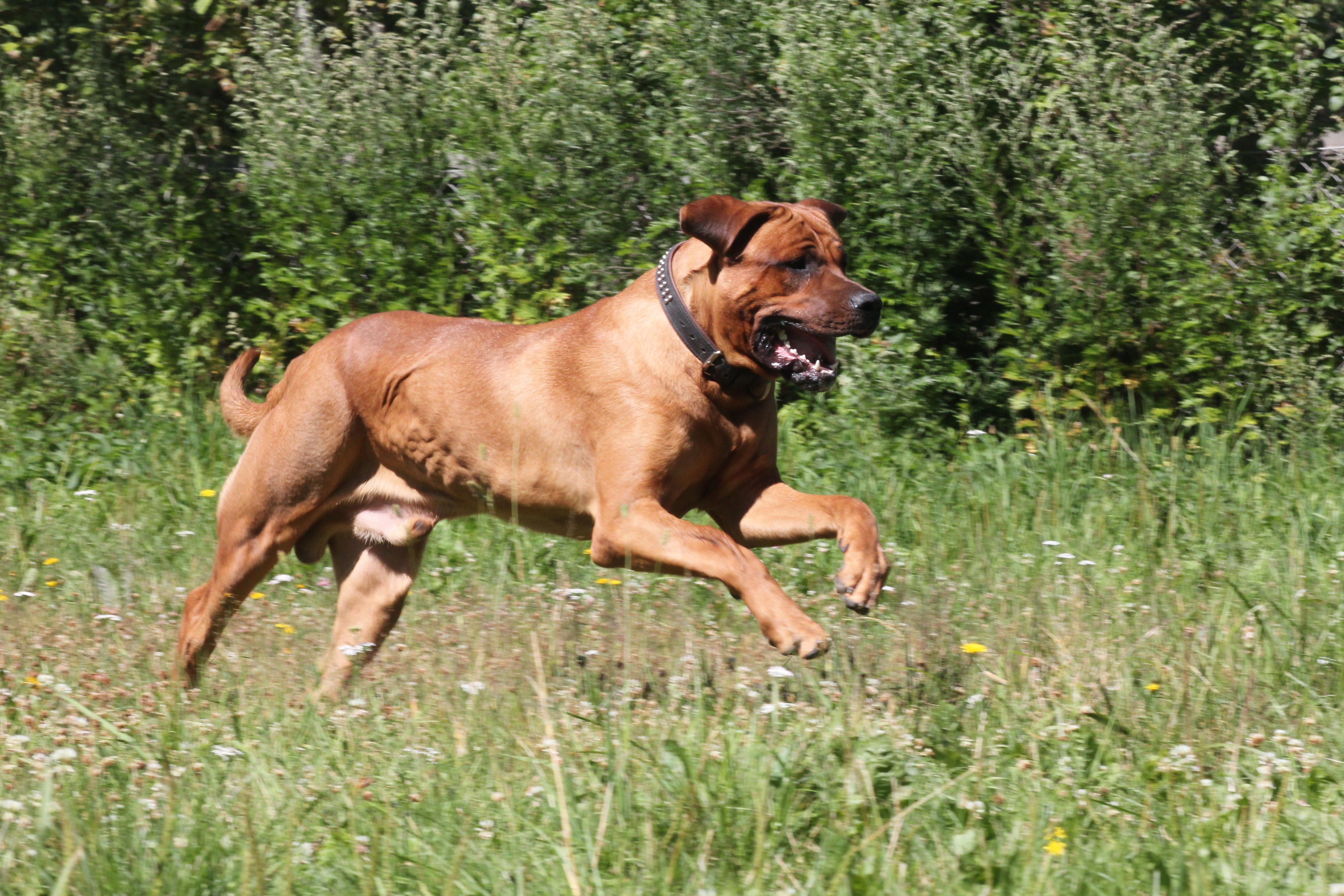 Immortalwarriors Akito - Tosa Inu